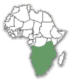 Мапа поширення виду Hystrix africaeaustralis